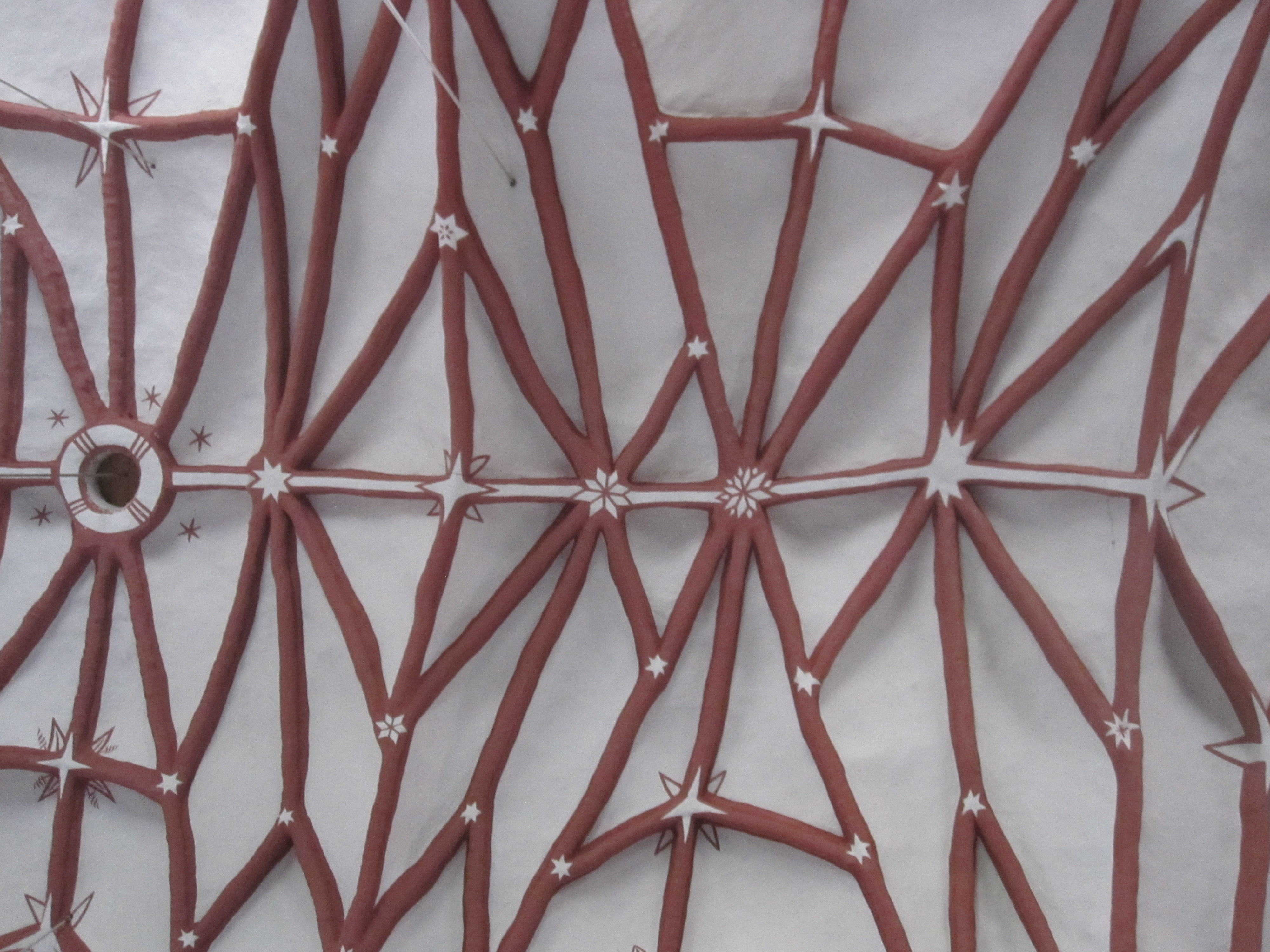 Das Gewölbe des Kirchenschiffs. Die Decke wurde nach dem Turmbrand um 1637 im Jahr 1653 erneuert. Das Gewölbe ist „eine große Tonne mit unregelmäßig eingeschnittenen Stichkappen“, es wurde von unten „ein Gewirr nachträglich aufgeklebter, grober Rippen netzgewölbeartig [auf] die vier Joche der Decke“ angebracht (Ulrich Pfeil, „St. Nikolai Bad Freienwalde“, Passau 1993). Die Farbigkeit aus dem Jahr 1972 entspricht dem Original des Jahres 1653.